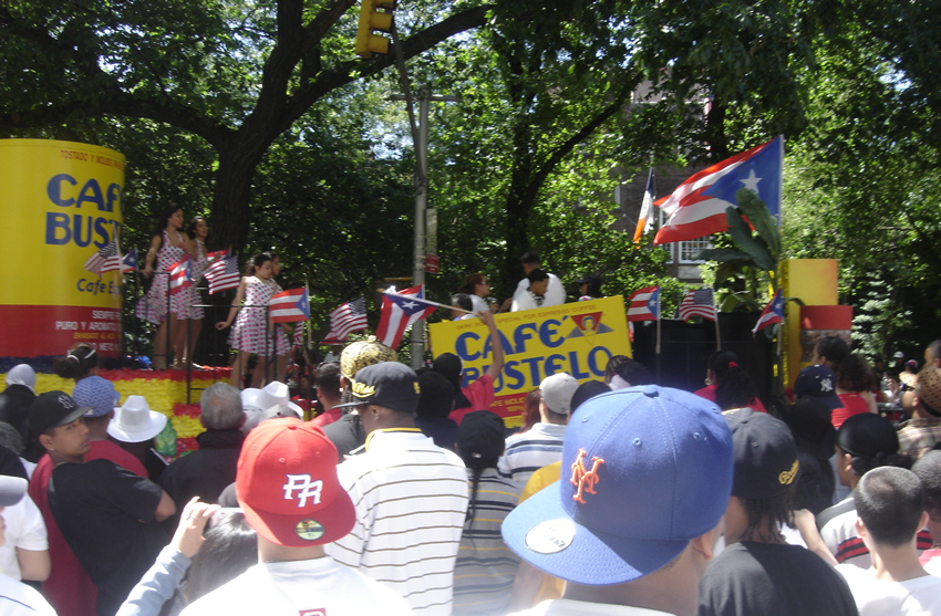 Puerto Rican Day Parade